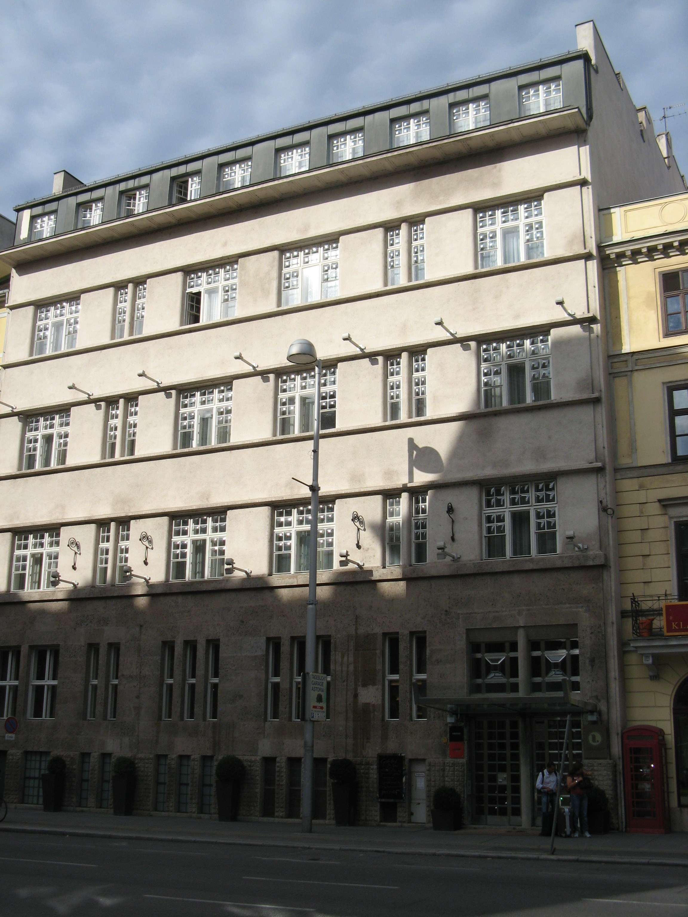 Ehemaliges Sanatorium Auersperg (1907-08) von Robert Oerley, Auerspergstraße 9, Wien-Josefstadt